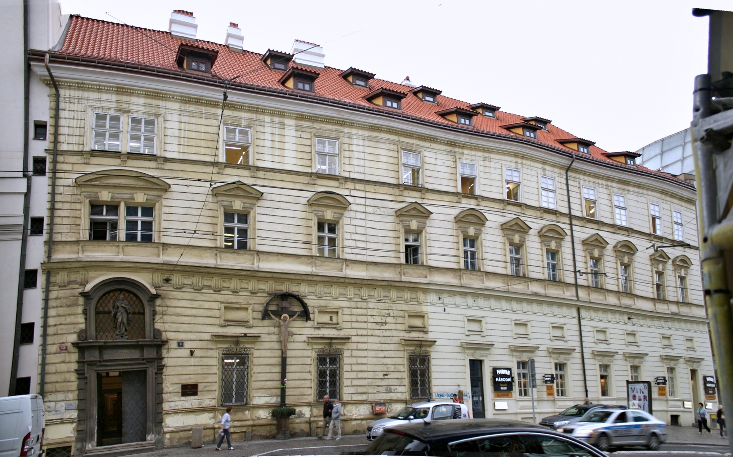 Klášter uršulinek při kostele sv. Voršily v Praze-Novém Městě